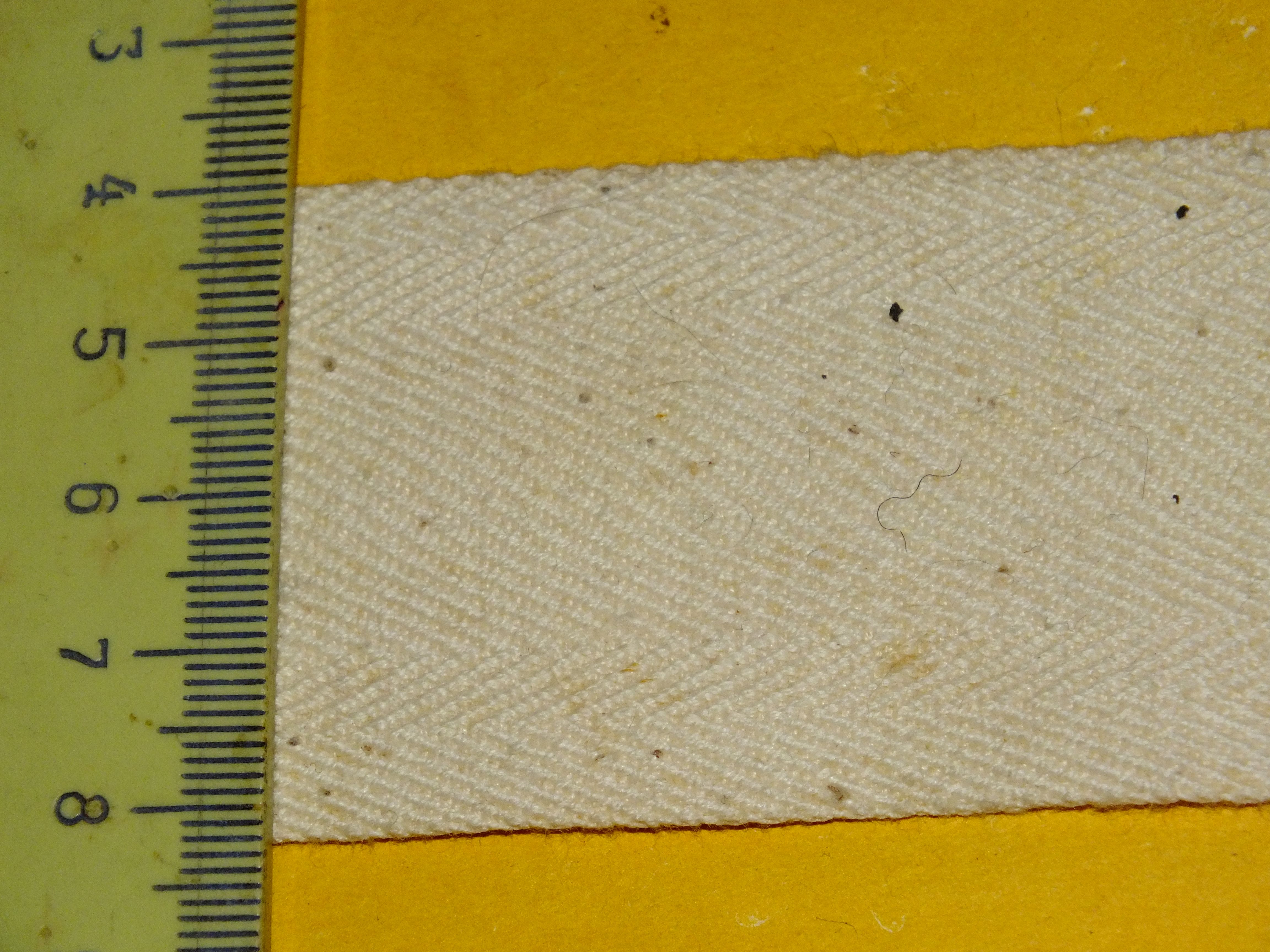 Белая киперная лента